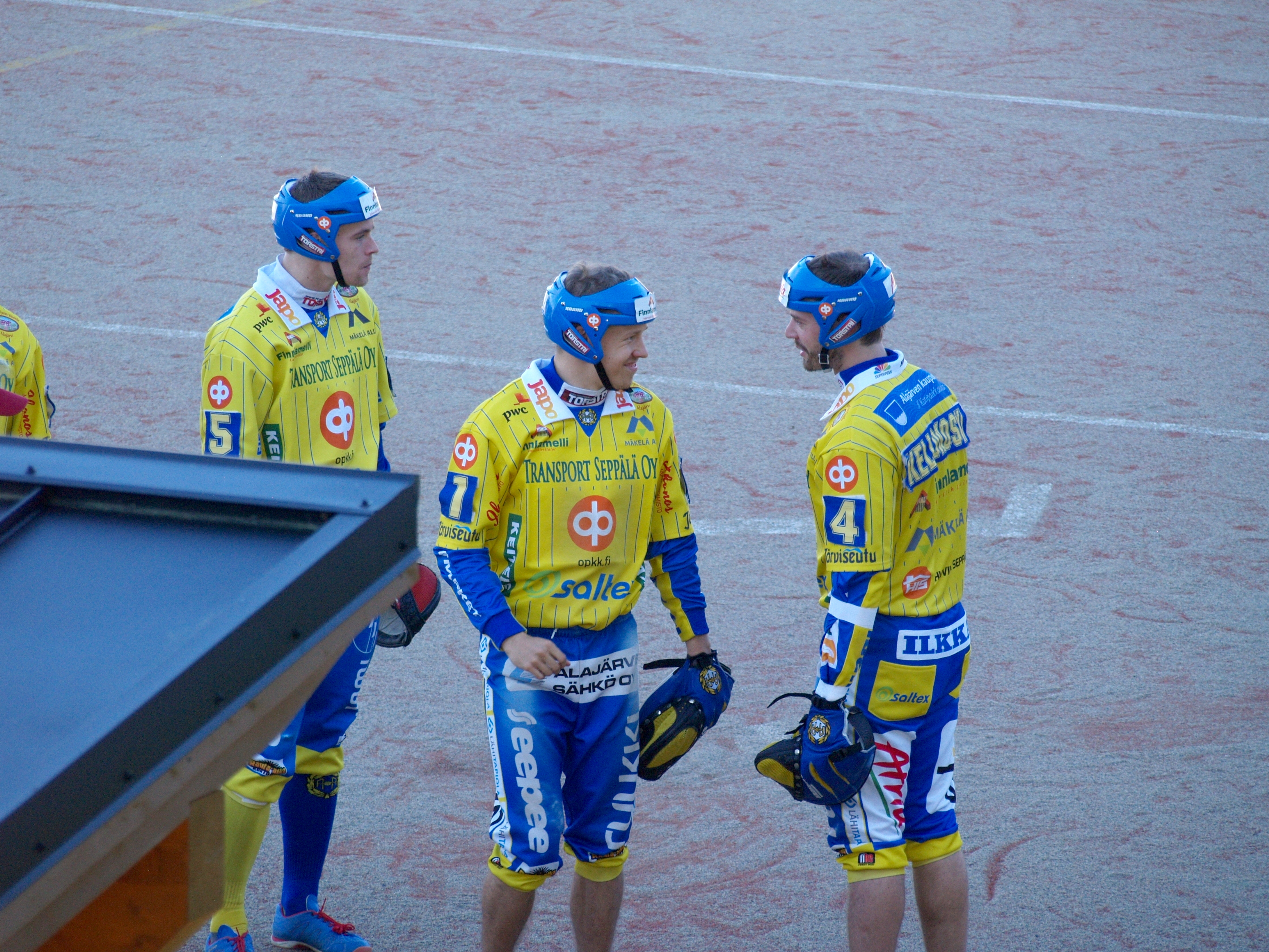 Alajärven Ankkurit - Vimpelin Veto pesäpallo-ottelu 23.6.2015. Kuvassa Sasu Iivarinen, Petrus Puputti ja Kari Kellokoski.